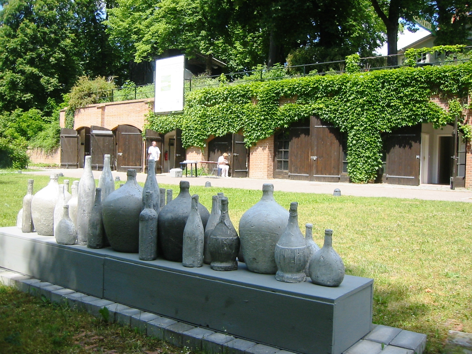 Kunstausstellung "Spektrale 5" in Luckau im Landkreis Dahme-Spreewald in Brandenburg